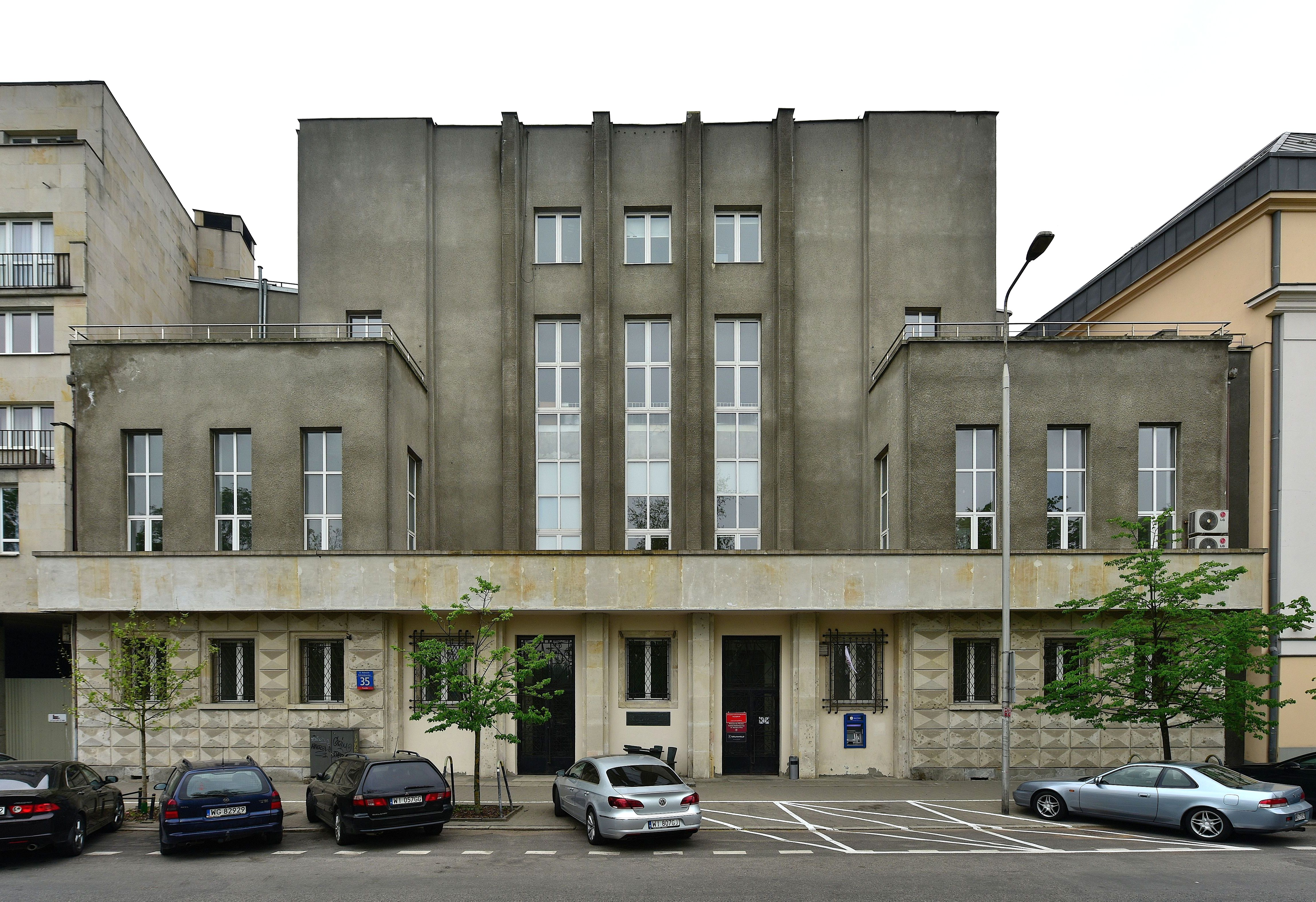 Budynek ZNP w Warszawie od strony ul. Wybrzeże Kościuszkowskie